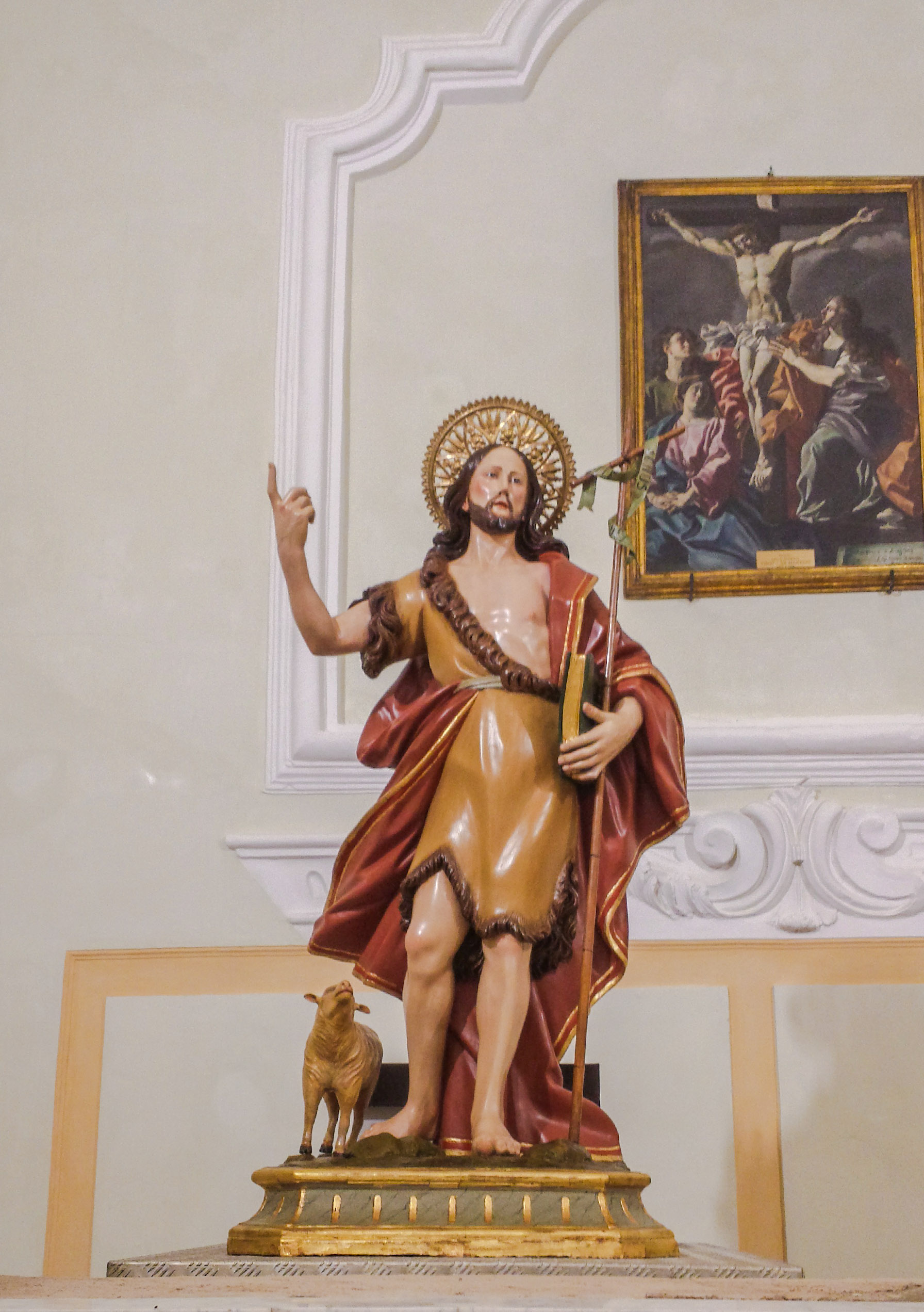 La Statua di San Giovanni Battista, patrono di Faicchio, custodita all'interno della Chiesa.